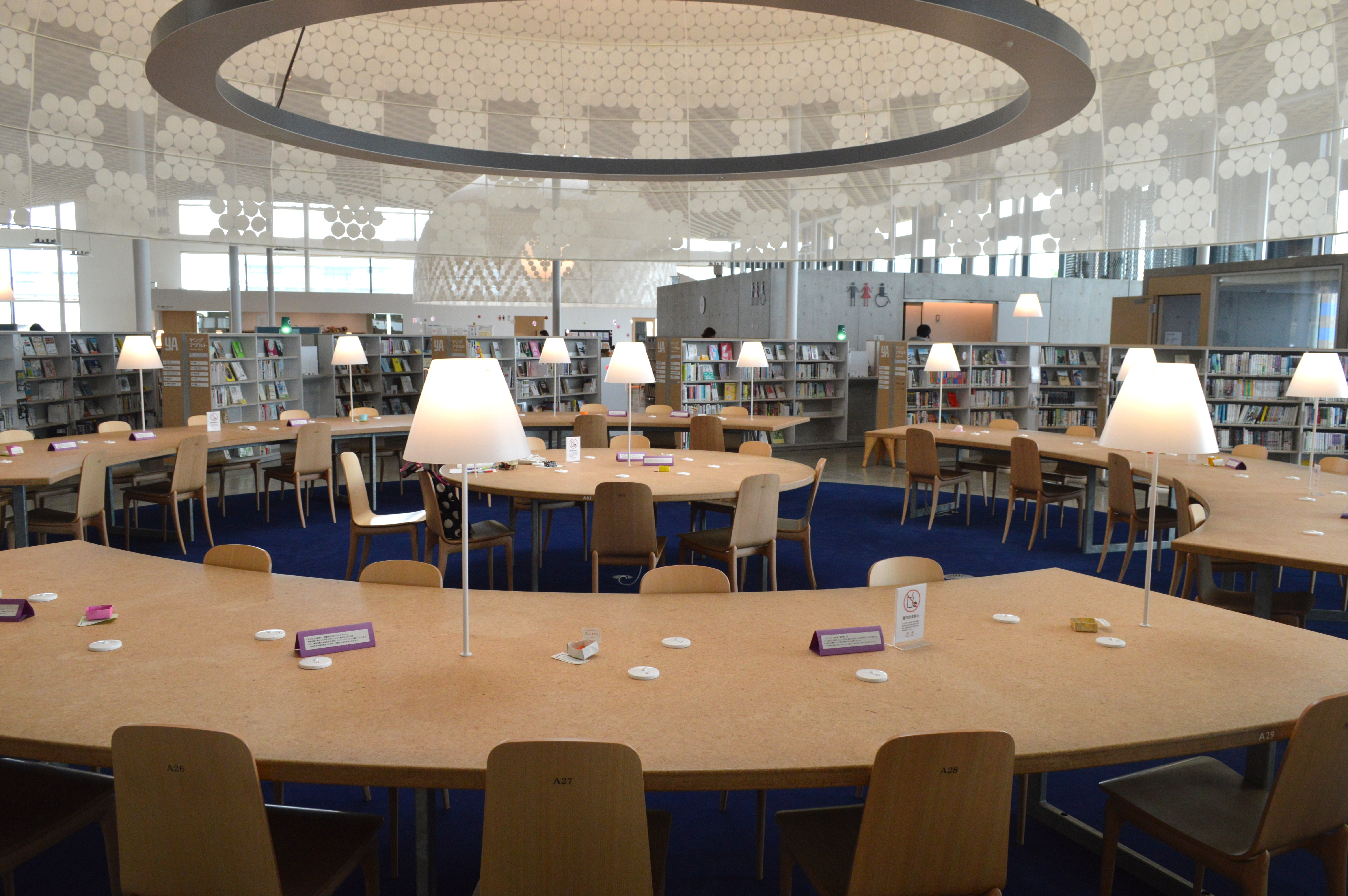 岐阜県岐阜市にあるみんなの森 ぎふメディアコスモス2階の岐阜市立中央図書館。